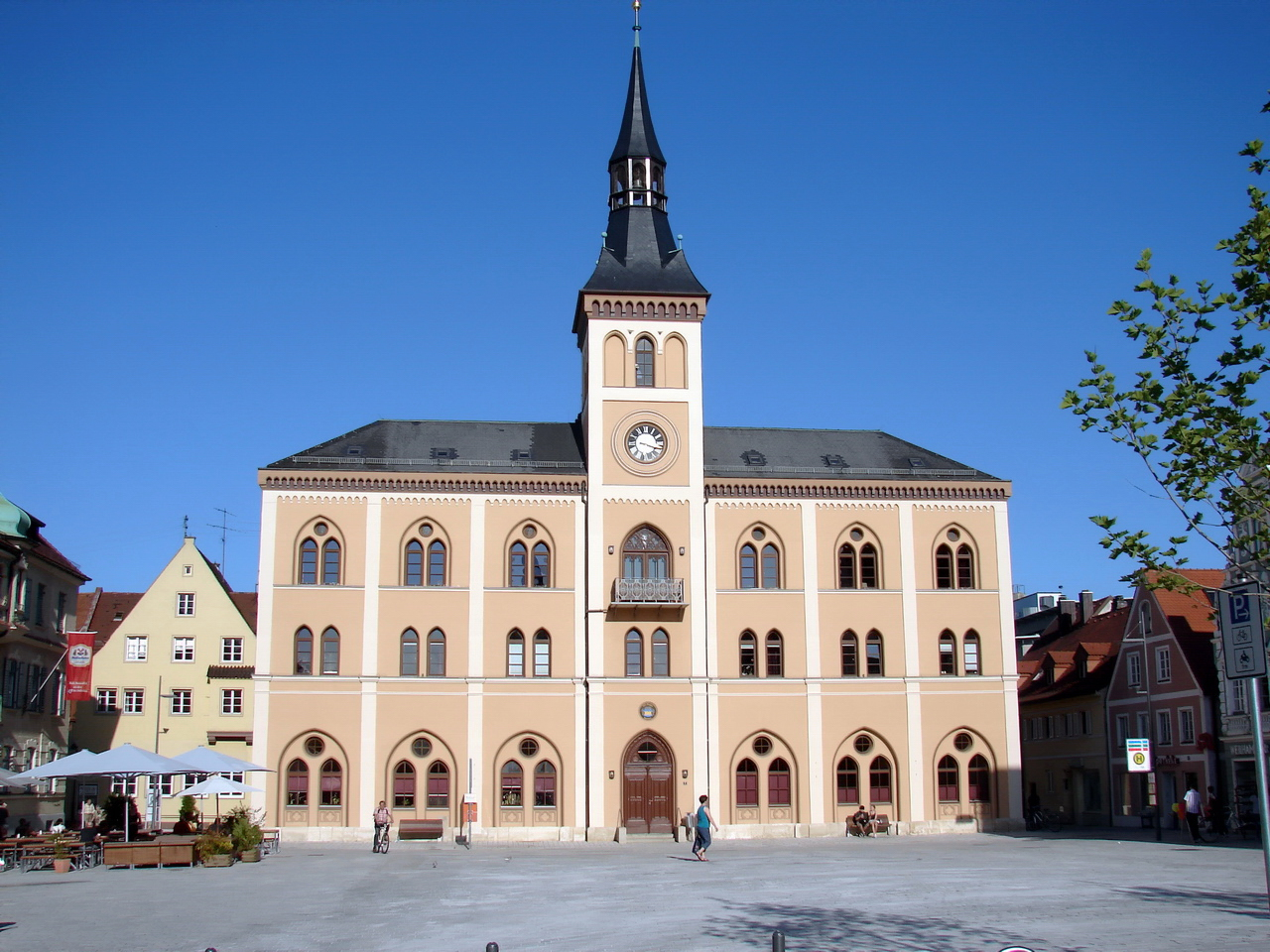 Das Rathaus am östlichen Ende des 300 Meter langen und 40 Meter breiten historischen 'Hauptplatzes'.